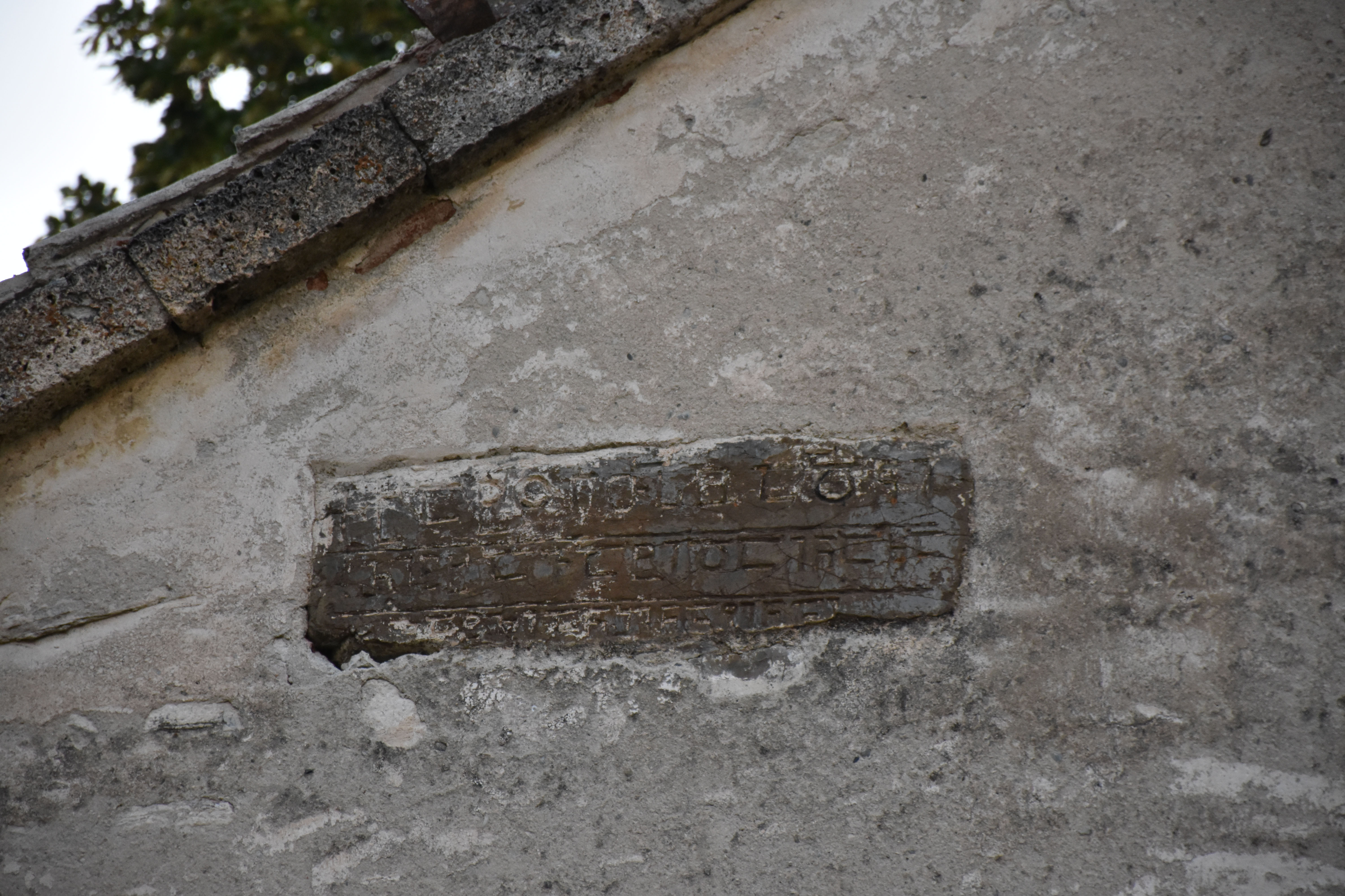 მაცხოვრის ეკლესია